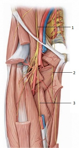 1. nervio crural 2. nervio obturador 3. nervio safeno